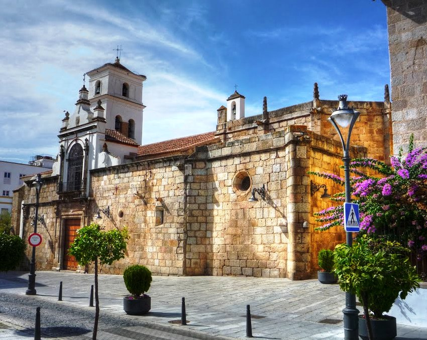 Catedral de Mérida desde la Plaza de España